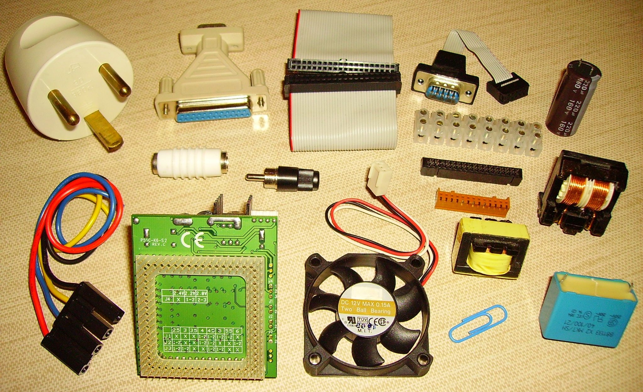 En : electrical and electronic components made from plastics. Most polymers are flammable. Resins contain flame retardants additives in order to reduce the probability that combustion will occur or spread. The paper clip gives the scale. Fr : des additifs ignifugeants inclus dans les résines de composants électriques ou électroniques résolvent la difficulté cruciale de la résistance au feu et de l'inflammabilité. Le classement au feu du matériau est défini par une norme. Facilité de transformation, cycle rapide, tolérances serrées, rigidité (ajout de 25 % de fibres de verre, par exemple), ténacité et tenue en température constituent d'autres contraintes à respecter, suivant l'application. Le trombone donne l'échelle.